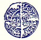 Гръцки печат от Струмица